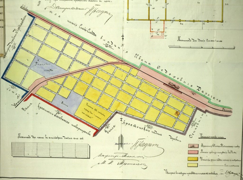 Беларуская (тарашкевіца): Асіпавічы (Asipavičy). Плян мястэчка